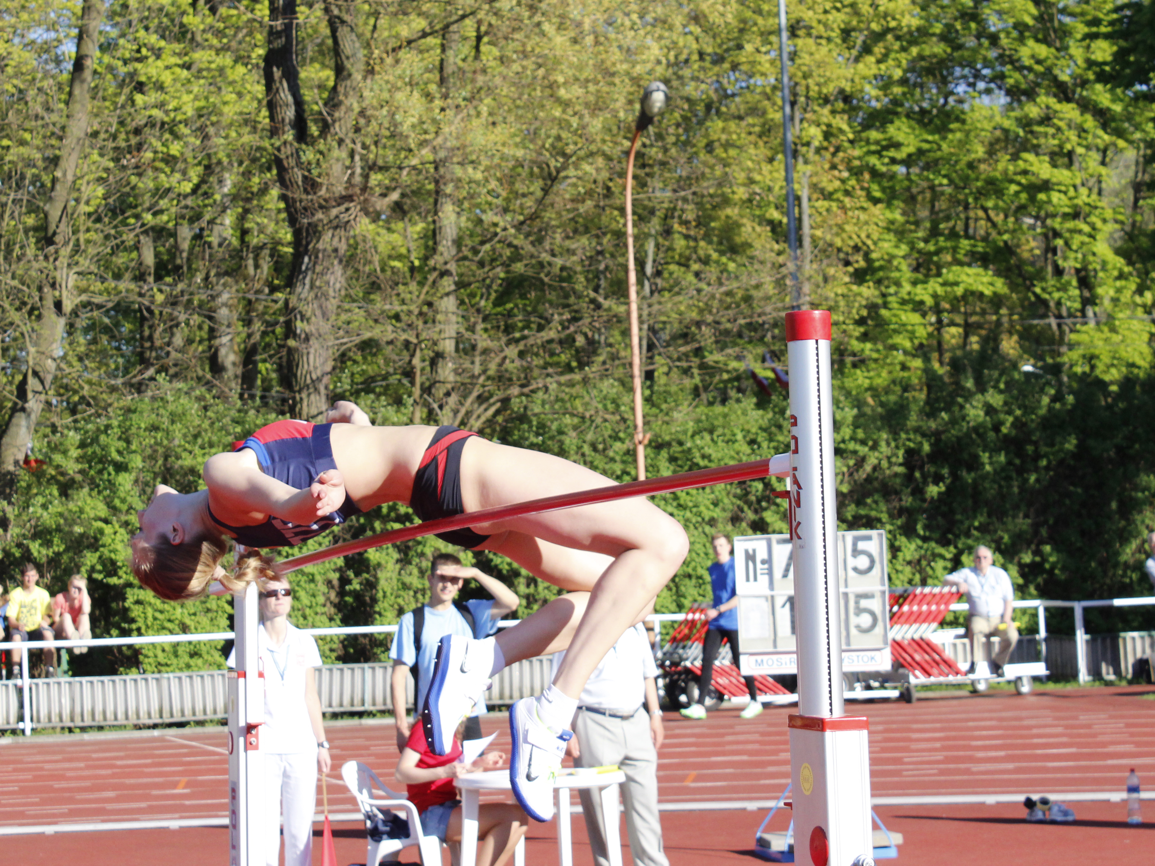 Kamila Stepaniuk podczas próby w skoku wzwyż na wysokości 185 cm. Białystok 3 Maja 2012